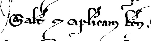 Salutatio aus dem Zisterzienserrundschreiben Celestis amor patrie Alexanders IV. von 1256: sal(u)t(em) et ap(osto)licam ben(edictionem)